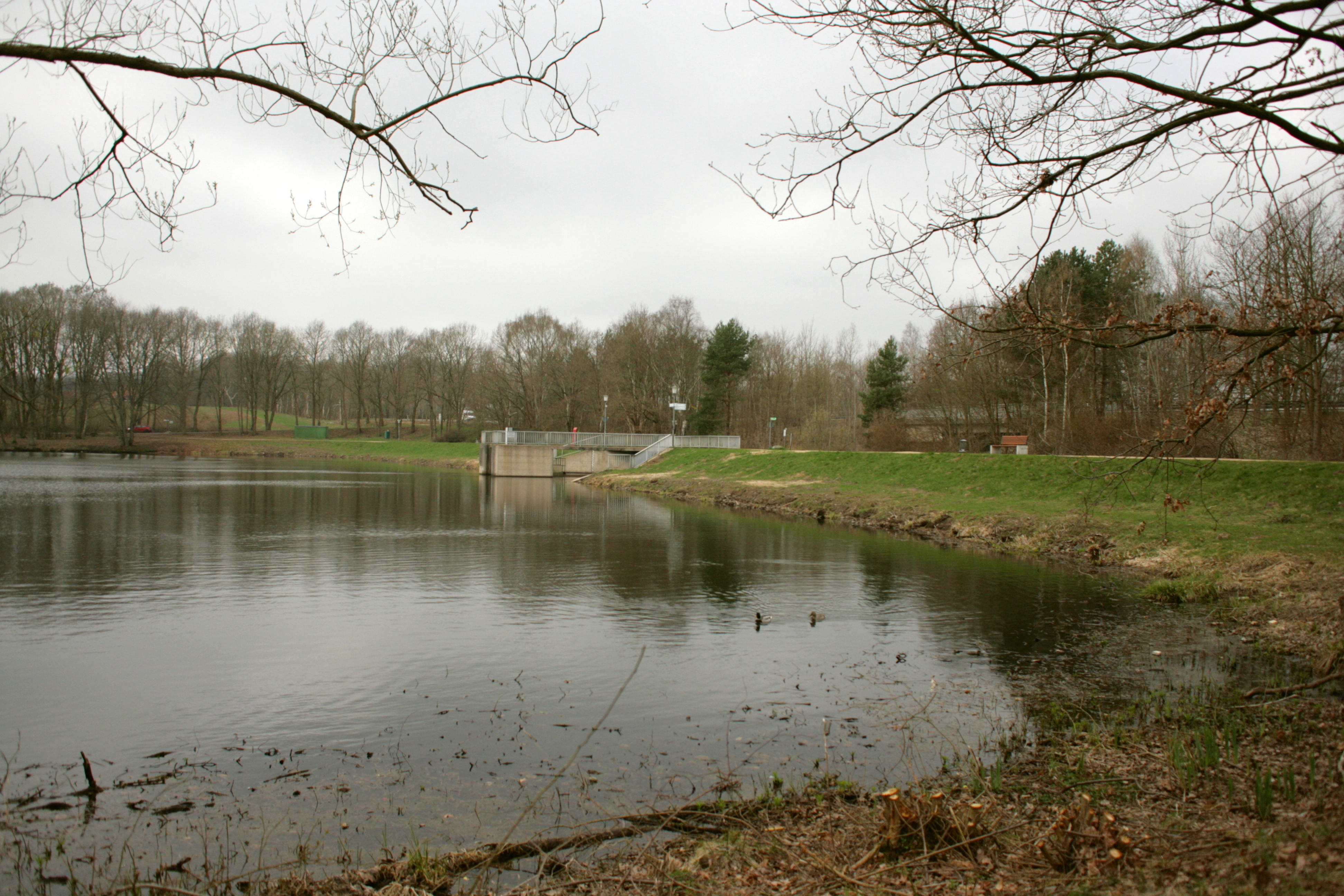 Lopausee in Amelinghausen